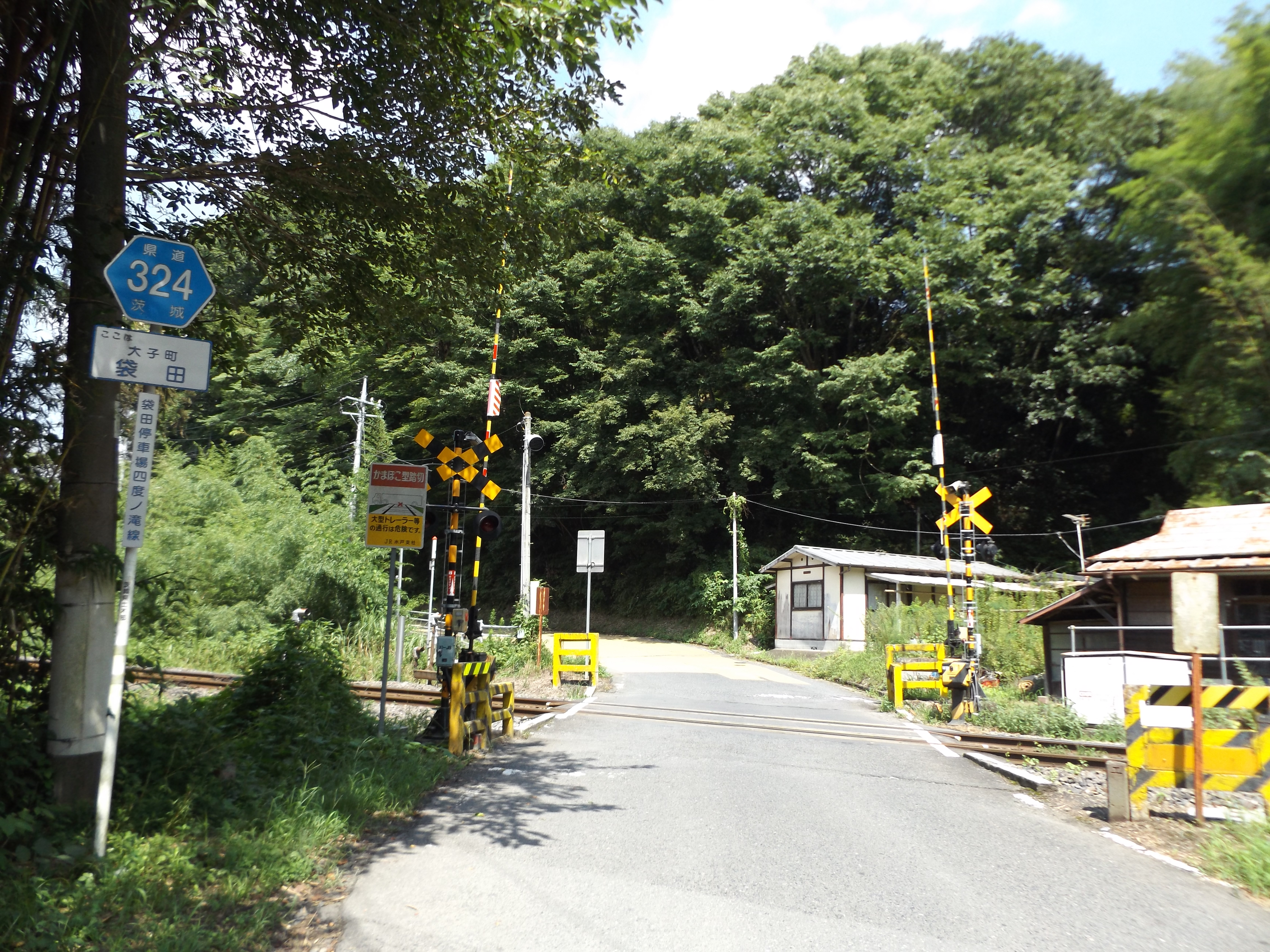 茨城県久慈郡大子町袋田の東日本旅客鉄道（JR東日本）水郡線袋田－常陸大子間にある「生瀬街道踏切」。 交差している道は茨城県道324号袋田停車場四度ノ滝線。